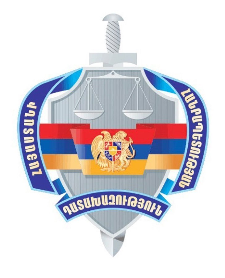 Эмблема Генеральной прокуратуры Армении